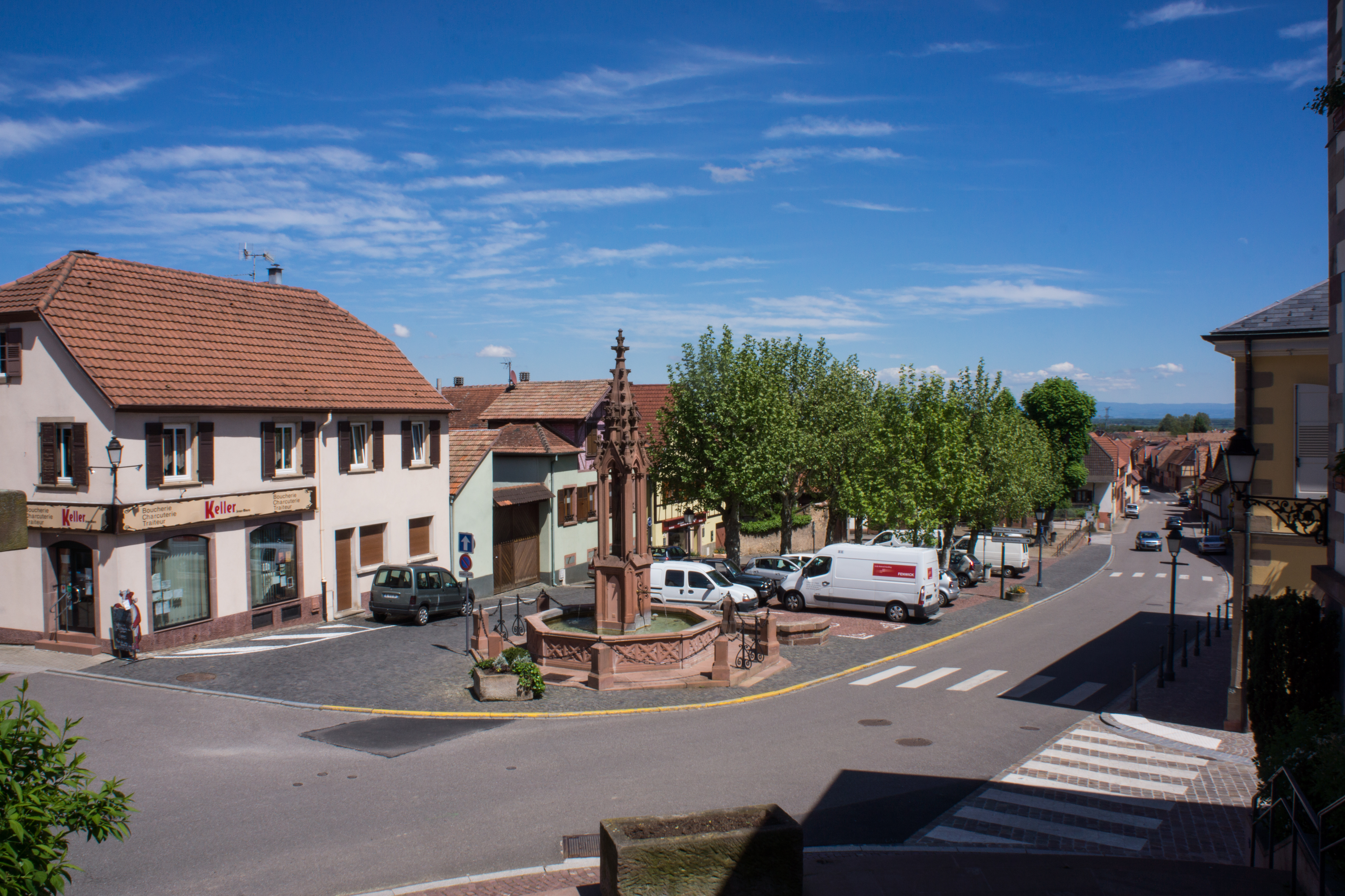 Place Saint-Rémy à Bischoffsheim en 2013